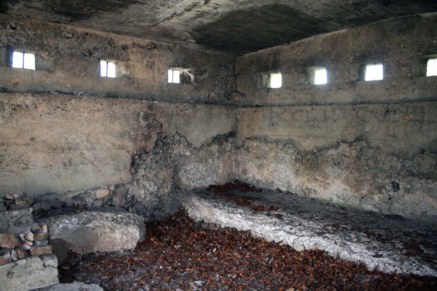 Das Innere des Turmes